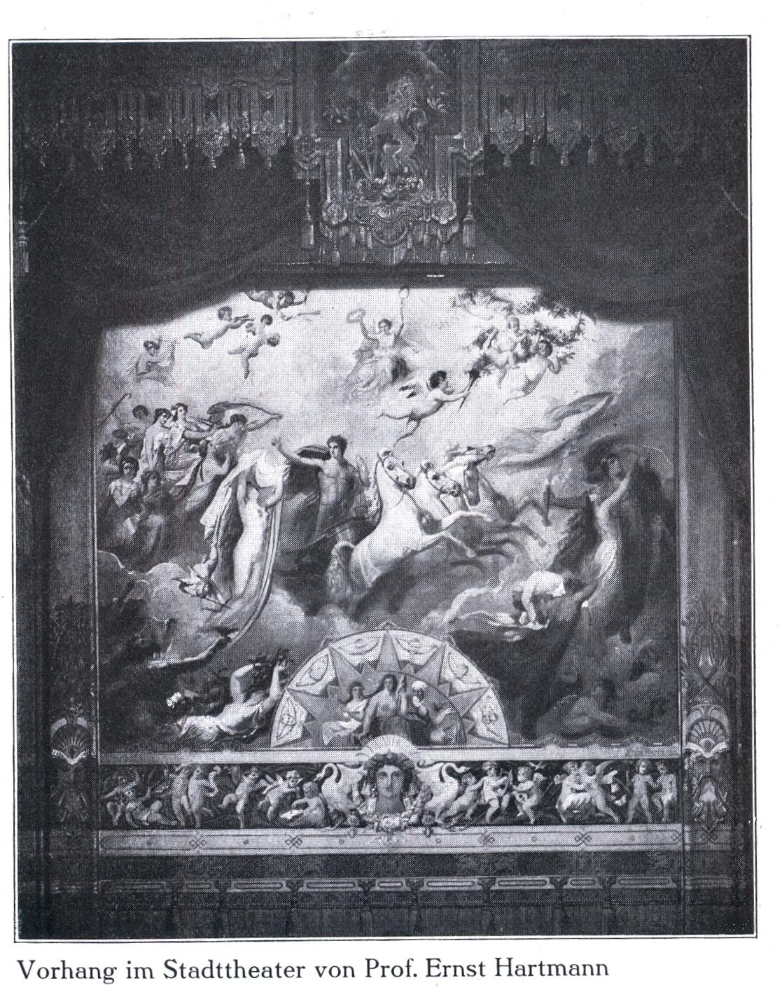 Vorhang erschaffen von Prof. Ernst Hartmann (1818–1900) im Düsseldorfer Stadttheaters an der Heinrich-Heine-Allee 16a in Düsseldorf